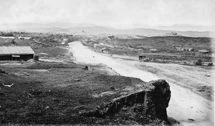 Calle del Guarda Viejo (luego Avenida Bolívar) en 1875